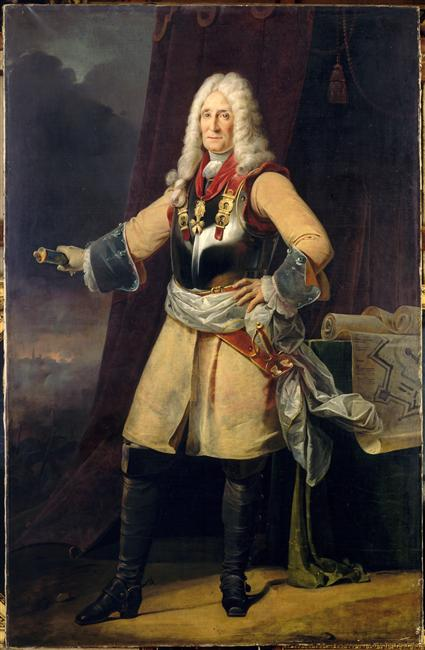 Claude François Bidal d'Asfeld (1665-1743), marquis d'Asfeld, maréchal de France en 1734